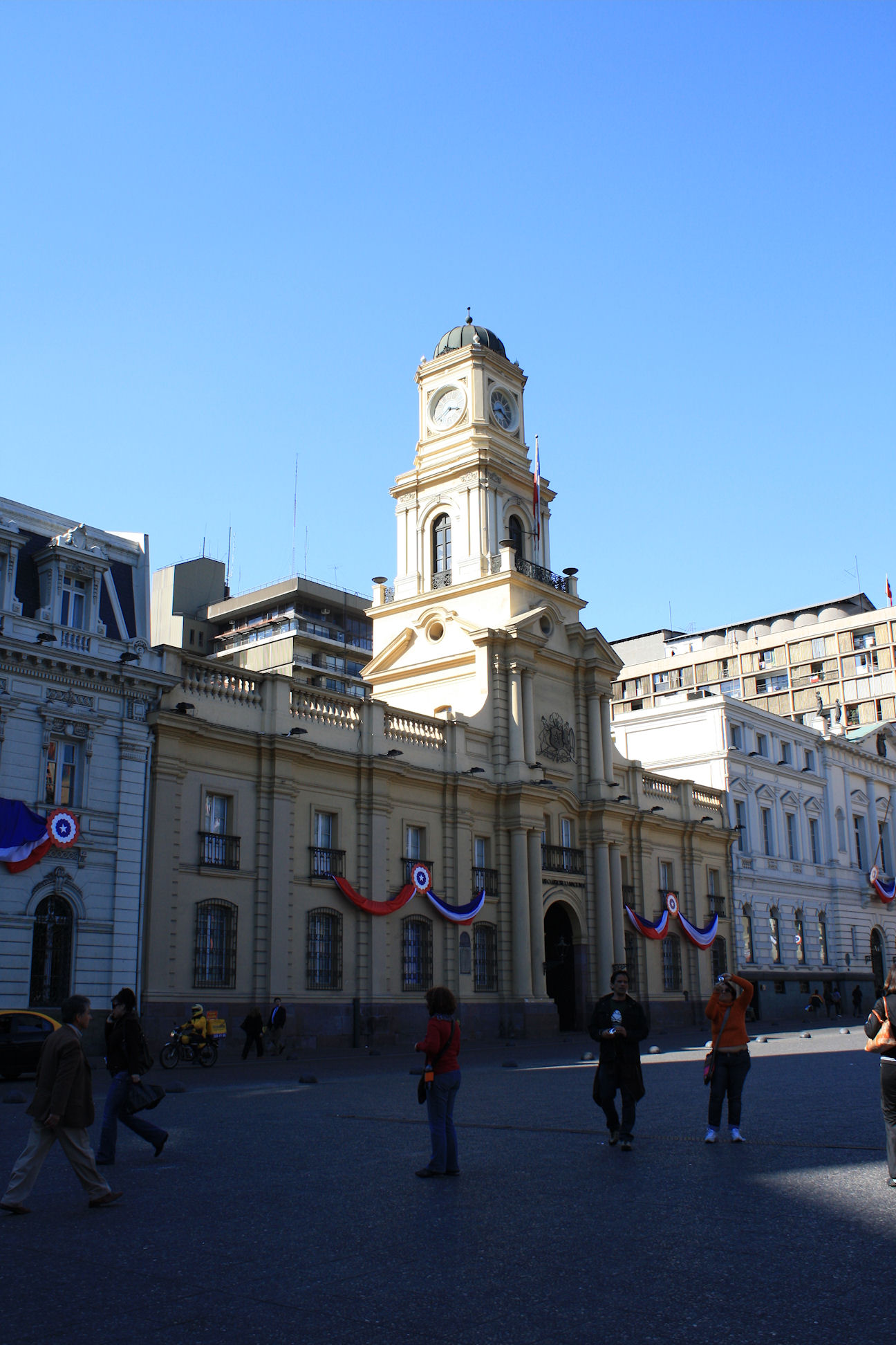 Museo Histórico Nacional , Plaza de Armas, Santiago